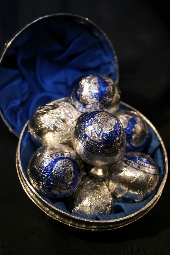 Original Salzburger Mozartkugel Fürst